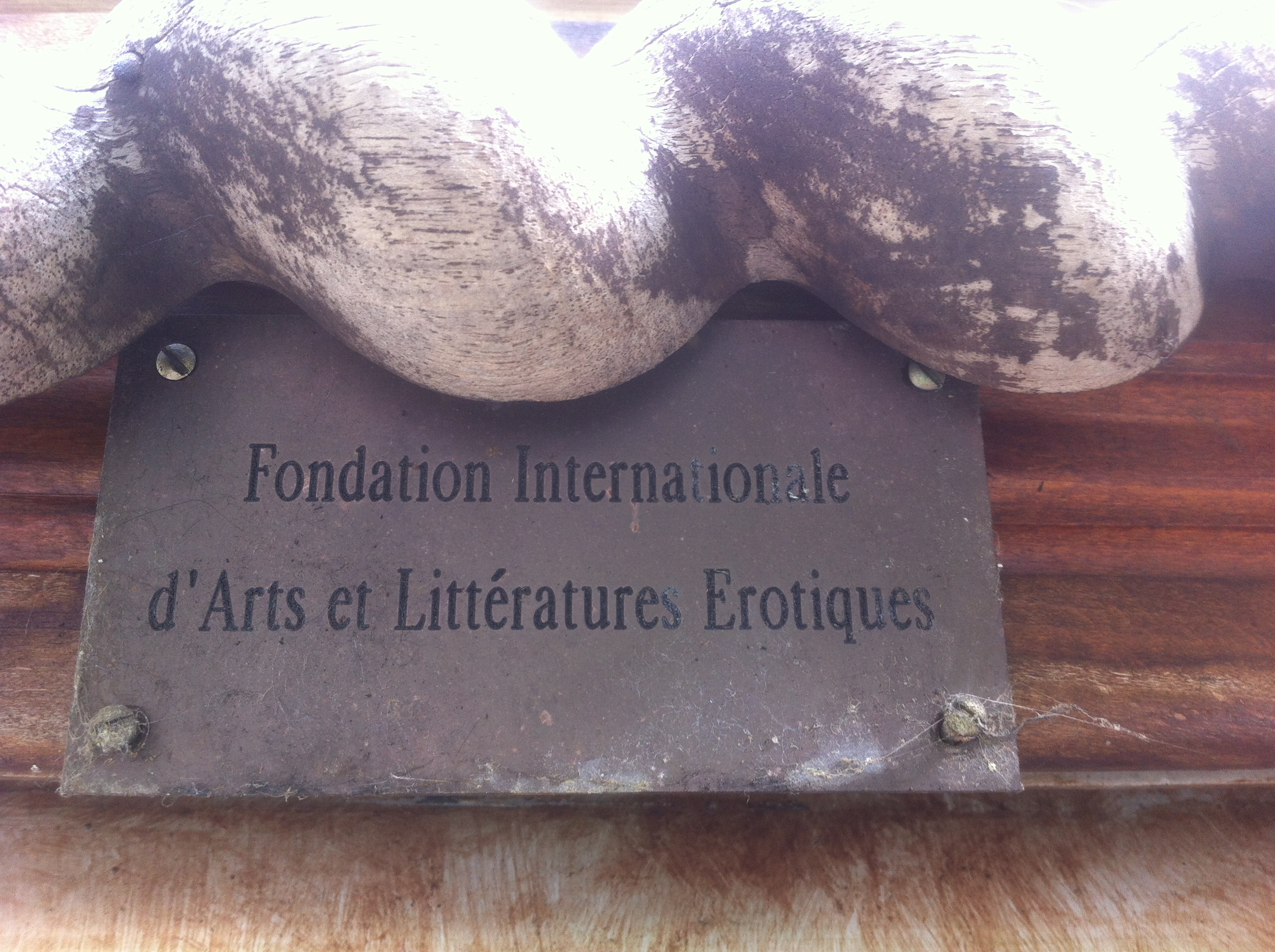 Plaquette F.I.N.A.L.E